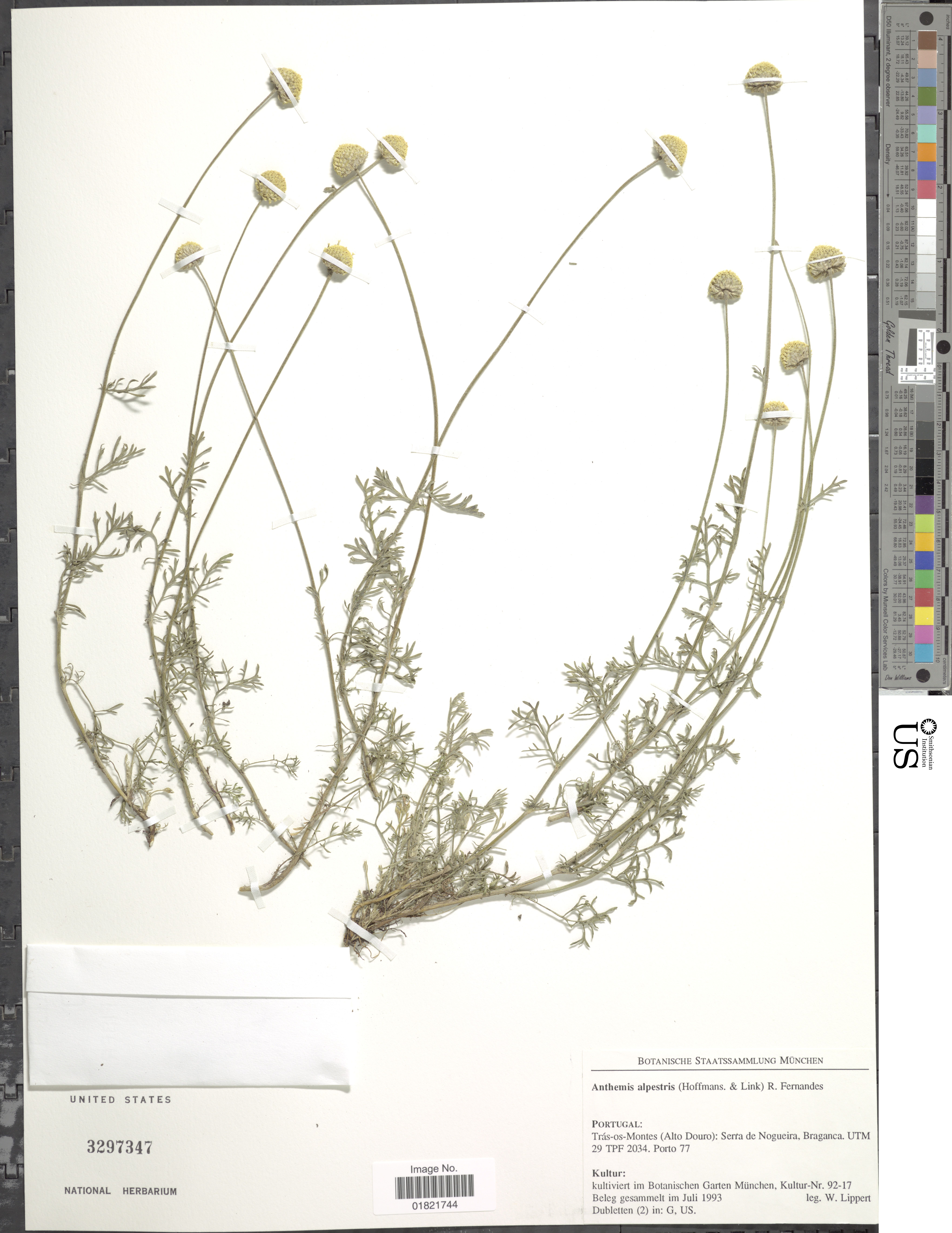 Pliego del herbario de US National Herbarium, Department of Botany, NMNH, Smithsonian Institution de Anthemis alpestris. Herborizada en 1993. Tras-os-Montes (Alto Douro): Serra de Nogueira, Braganca. UTM 29 TPF 2034. Porto 77. PORTUGAL